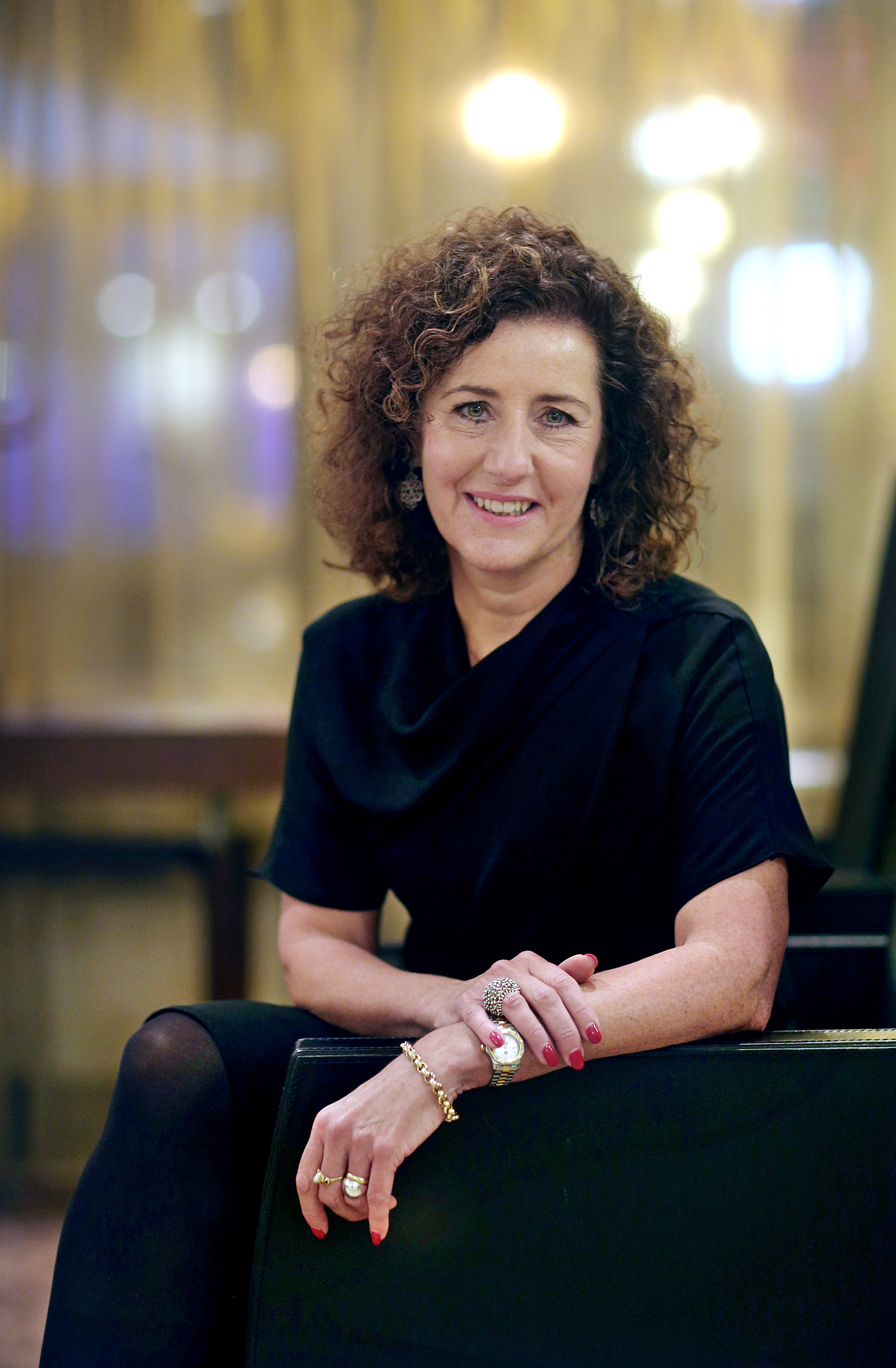 Ingrid van Engelshoven, Tweede Kamerlid voor D66.